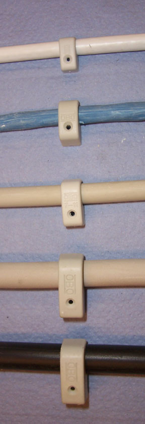 Hier sieht man eine Auswahl an Nagelschellen mit verschiedenen Leitungen. von oben nach unten: Koazialkabel Netzwerkkabel 2 x Mantelleitung NYM 1 x Erdkabel NYY